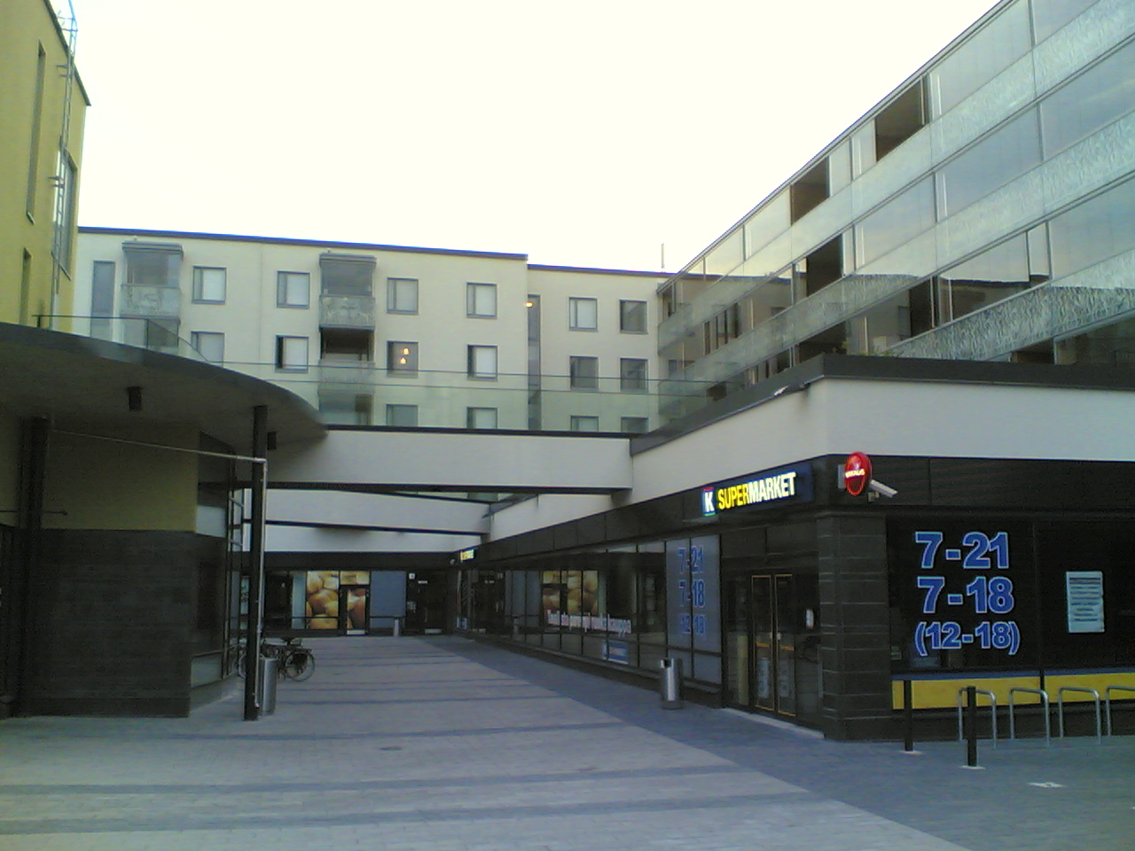 Myllypuron Ostoskeskus